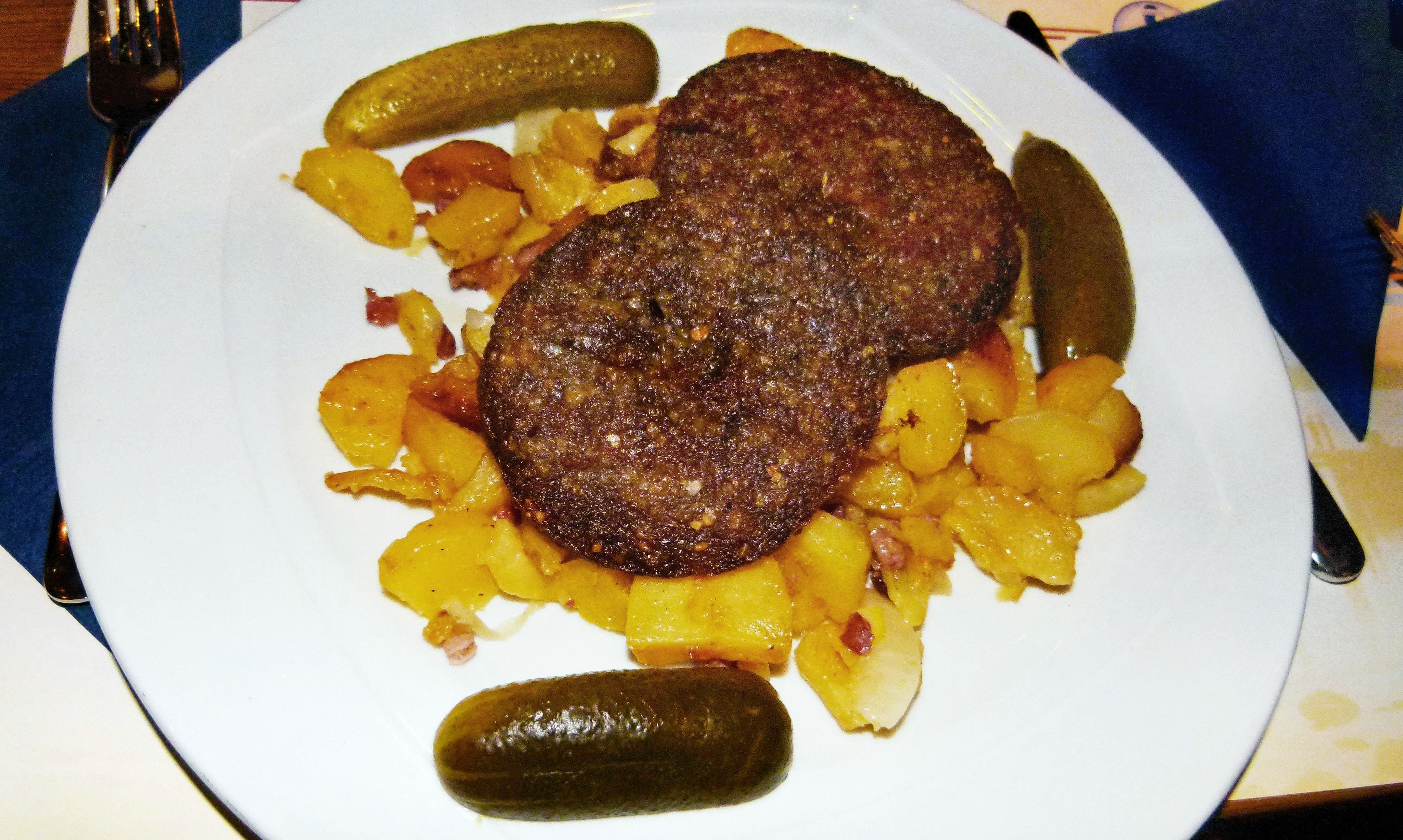 Bremer Knipp im Restaurant Friesenhof in der Bremer Altstadt